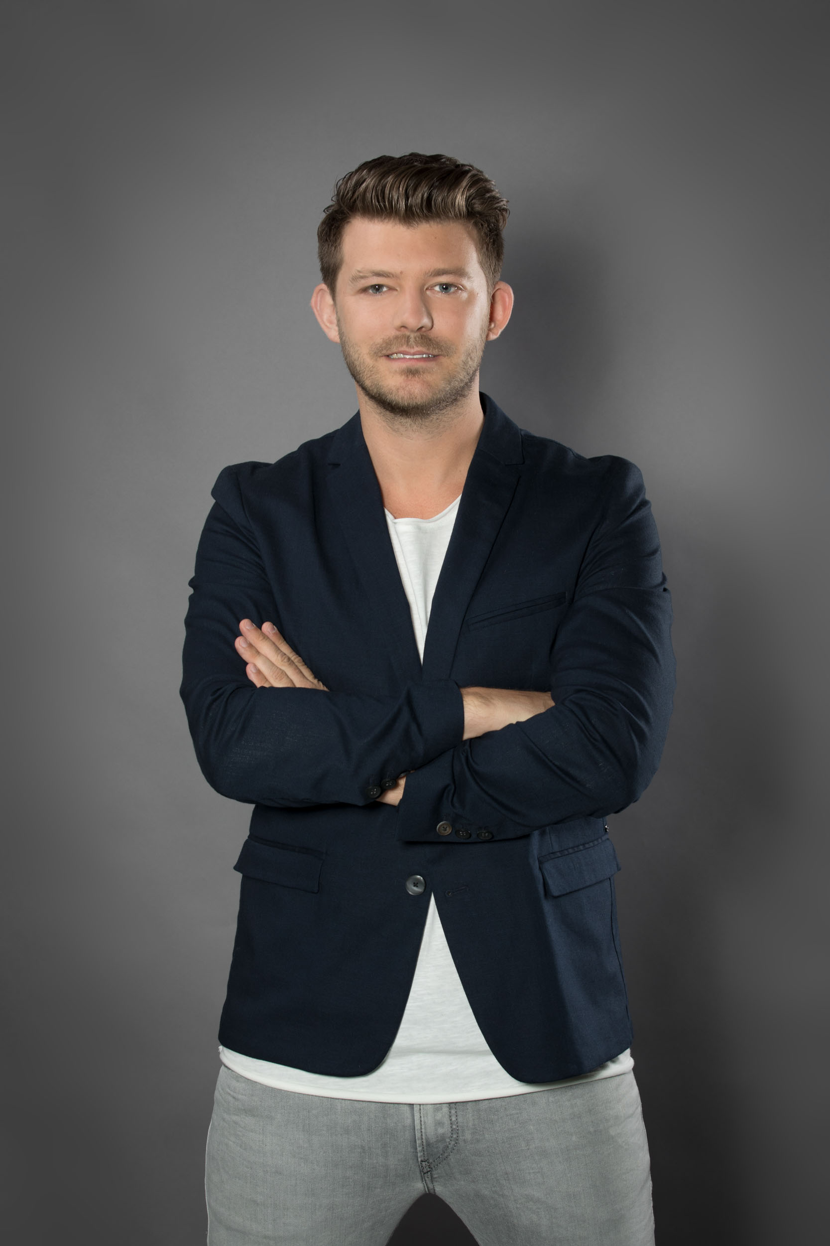 (c) Matthias Kniepeiss